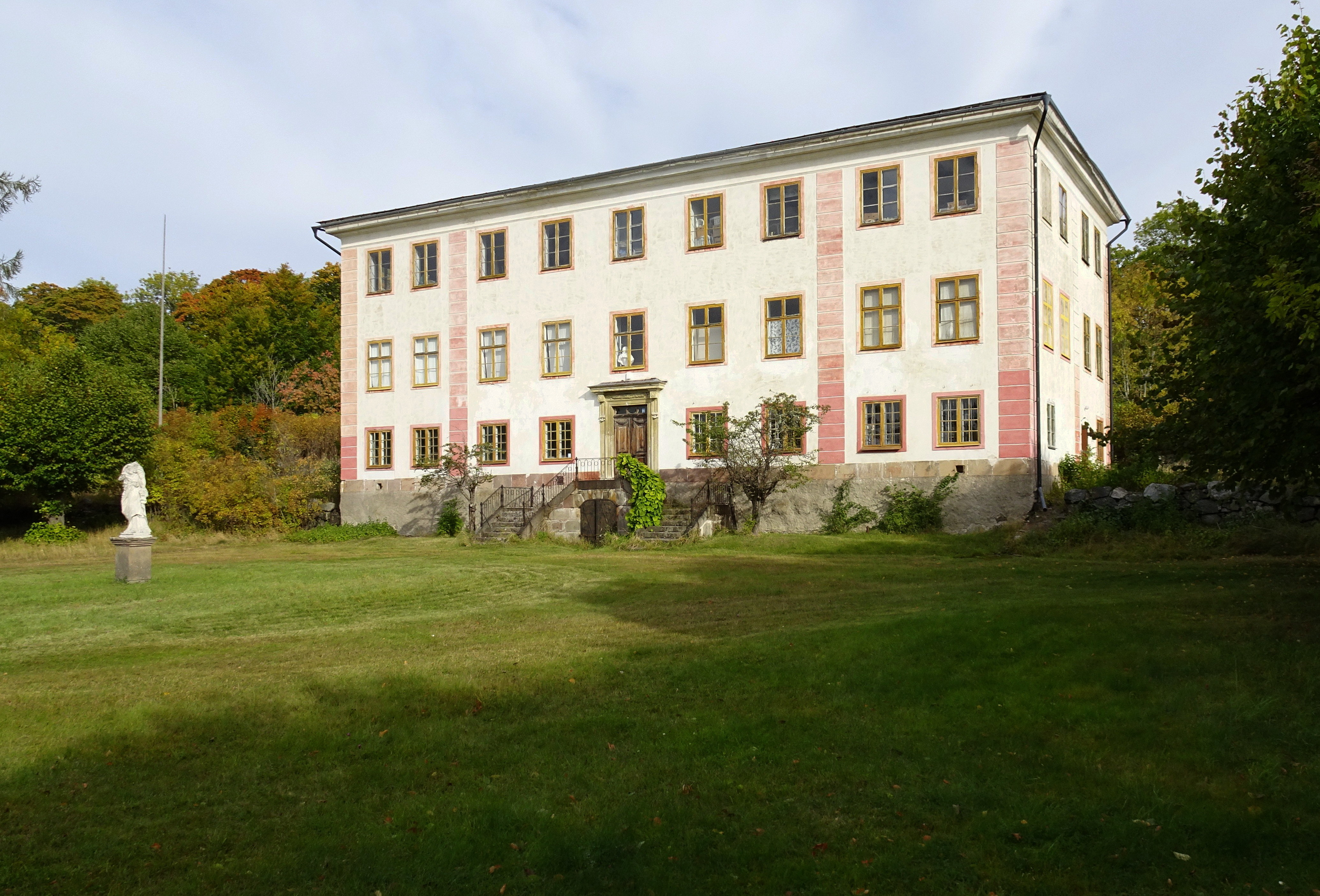 Ekensberg säteri, huvudbyggnad